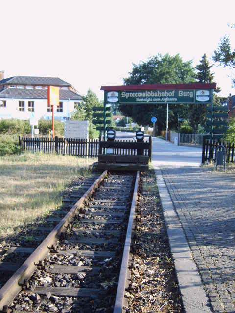 Schienenstrang am Spreewaldbahnhof in Burg aufgenommen am 19. Juni 2006 von Olaf Meister